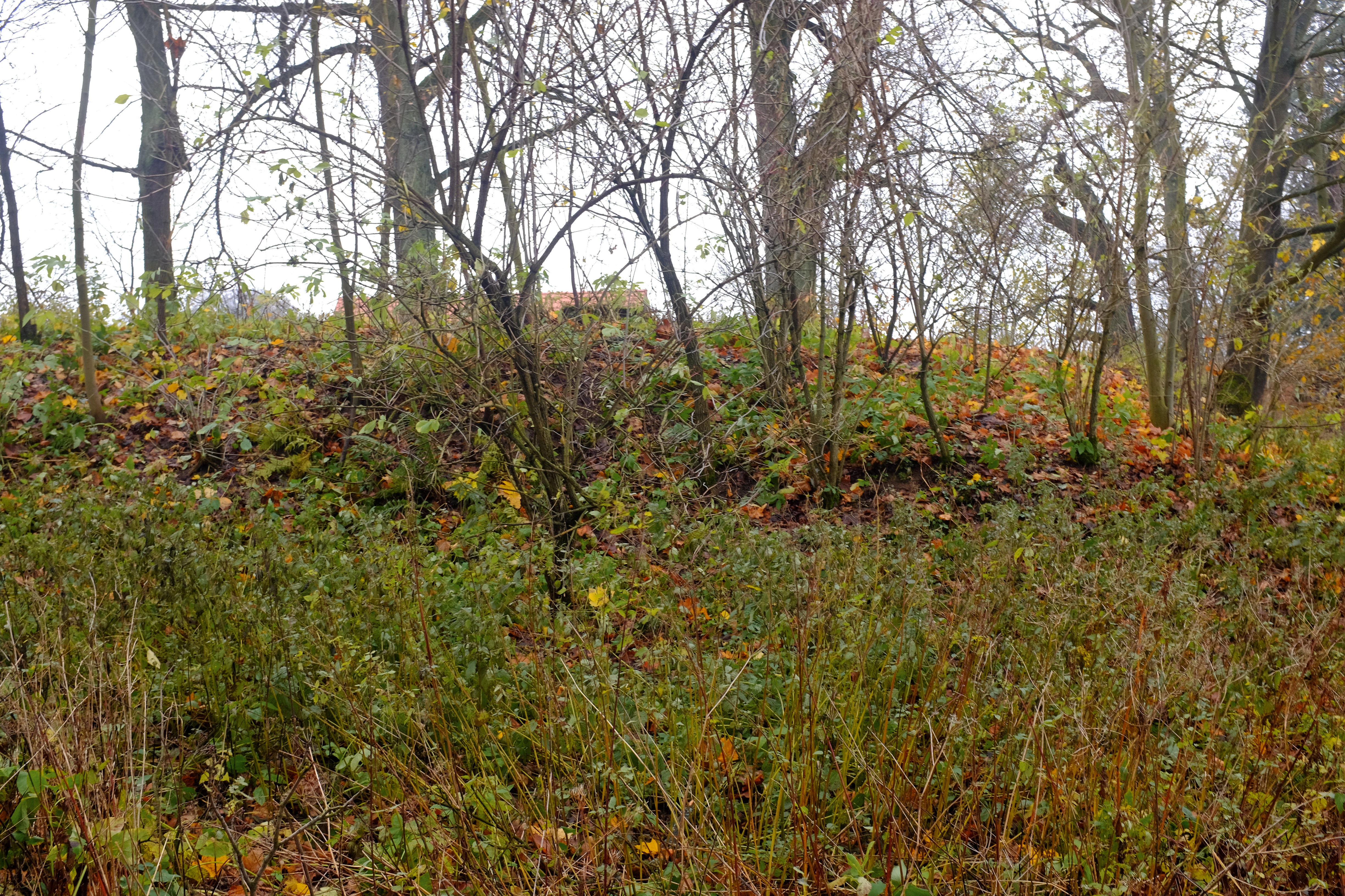 Tvrziště, při západní zdi hřbitova, Kostelní Bříza.